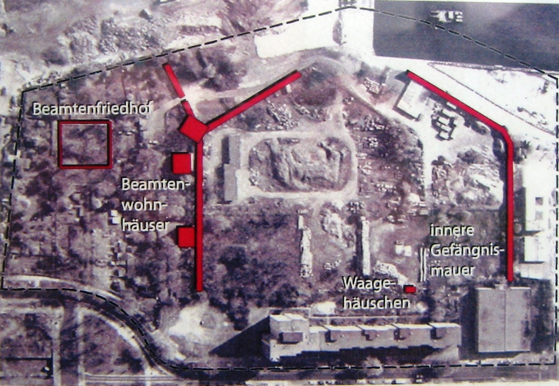 Luftbild mit den Überresten des Zellengefängnisses auf dem Geschichtspark Ehemaliges Zellengefängnis Moabit auf dem Gelände des ehemaligen Zellengefängnis Lehrter Straße in Berlin-Moabit (Mitte), aufgenommen auf einer Informationssäule an der Invalidenstraße